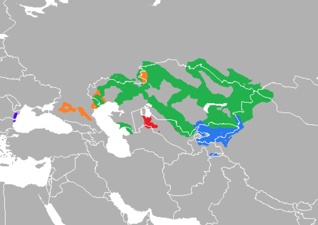 Lenguas cumano-nogaya, de la rama de las lenguas túrquicas noroccidentales, de la familia altaica. Idioma kazajo Idioma kirguís Idioma karakalpak Idioma nogai